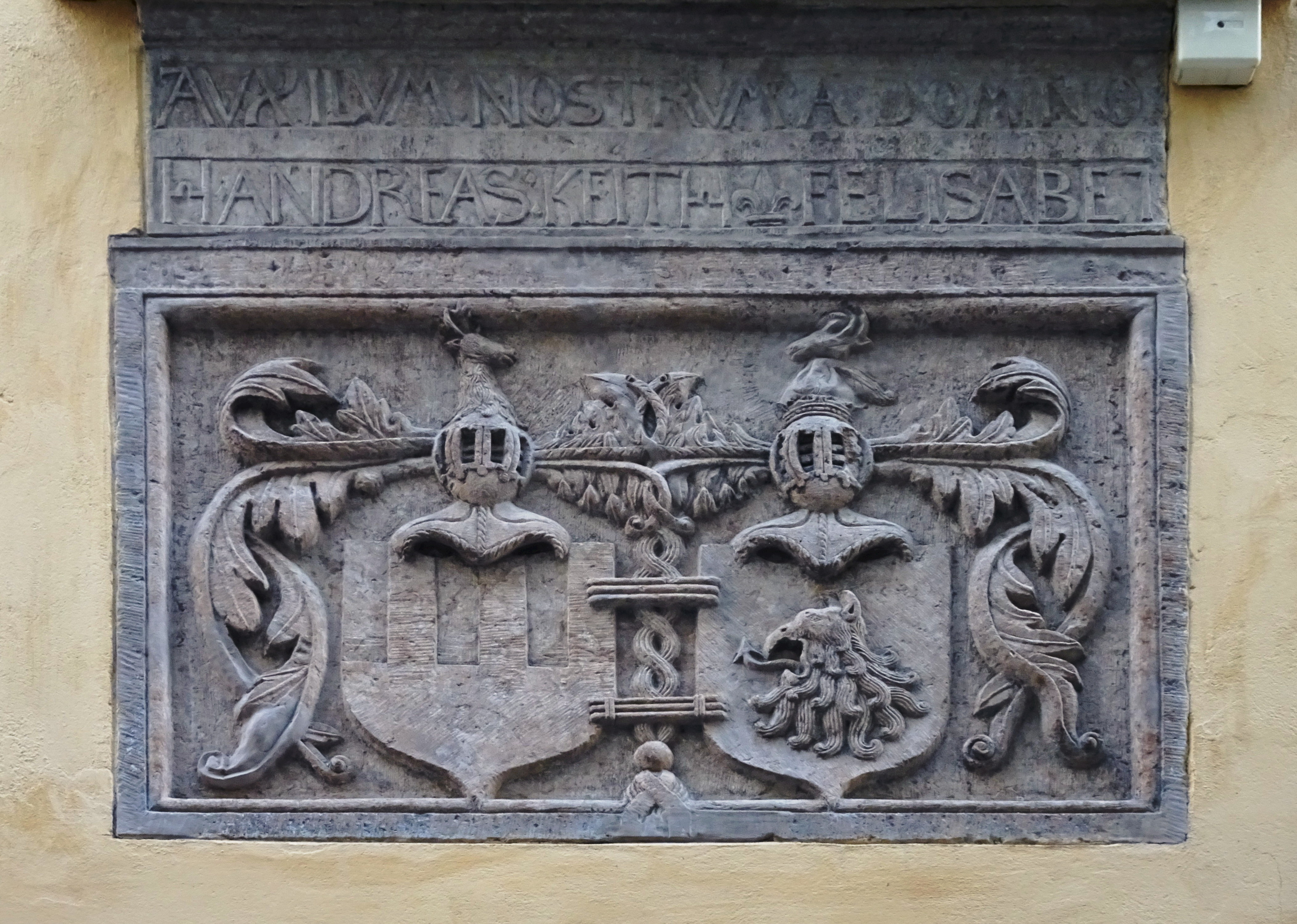 Sten med Anders Keiths och Elisabet Birgersdotters Grips vapen på Baggensgatan 27